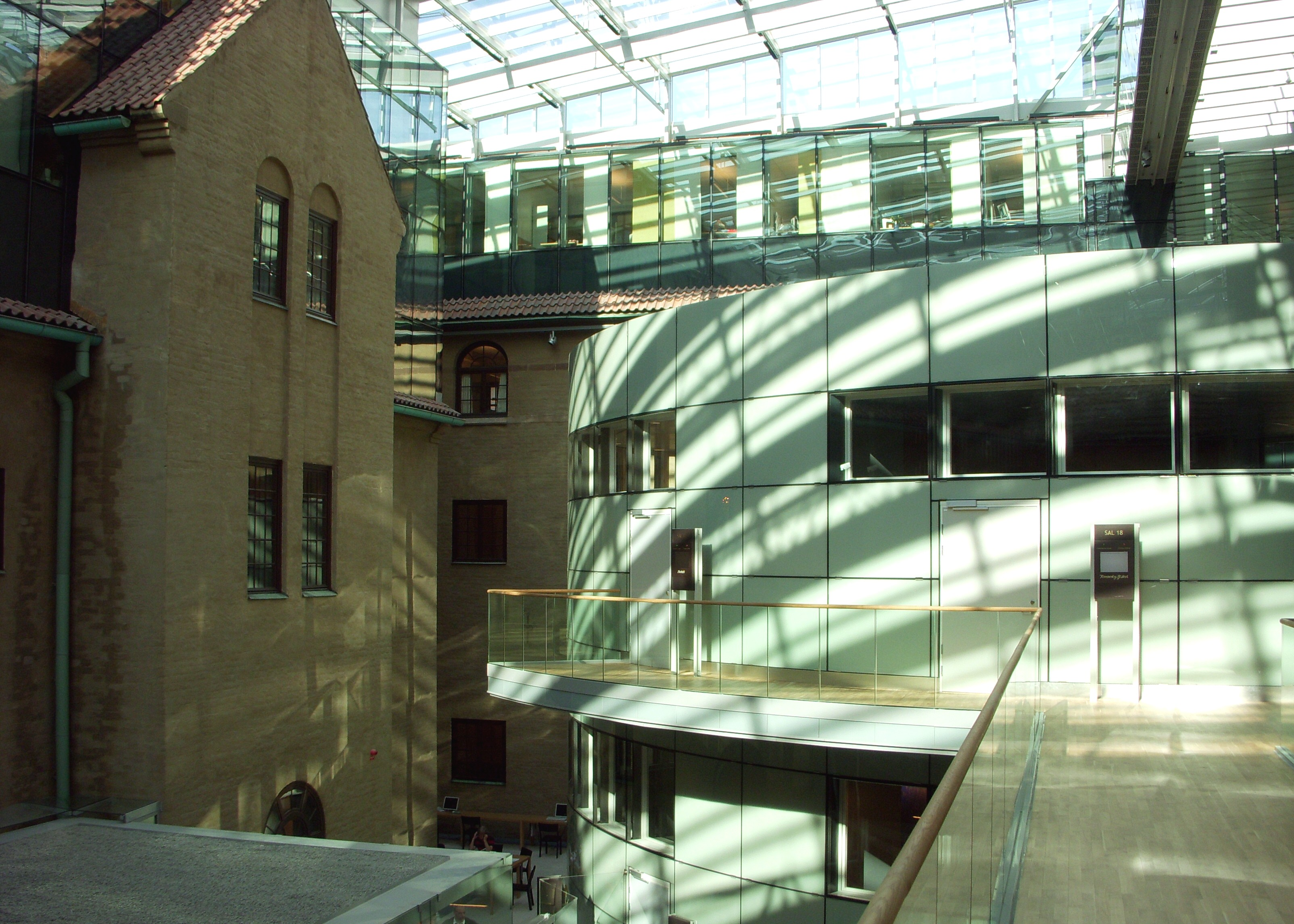 Stockholms Rådhus, inglasade innergården